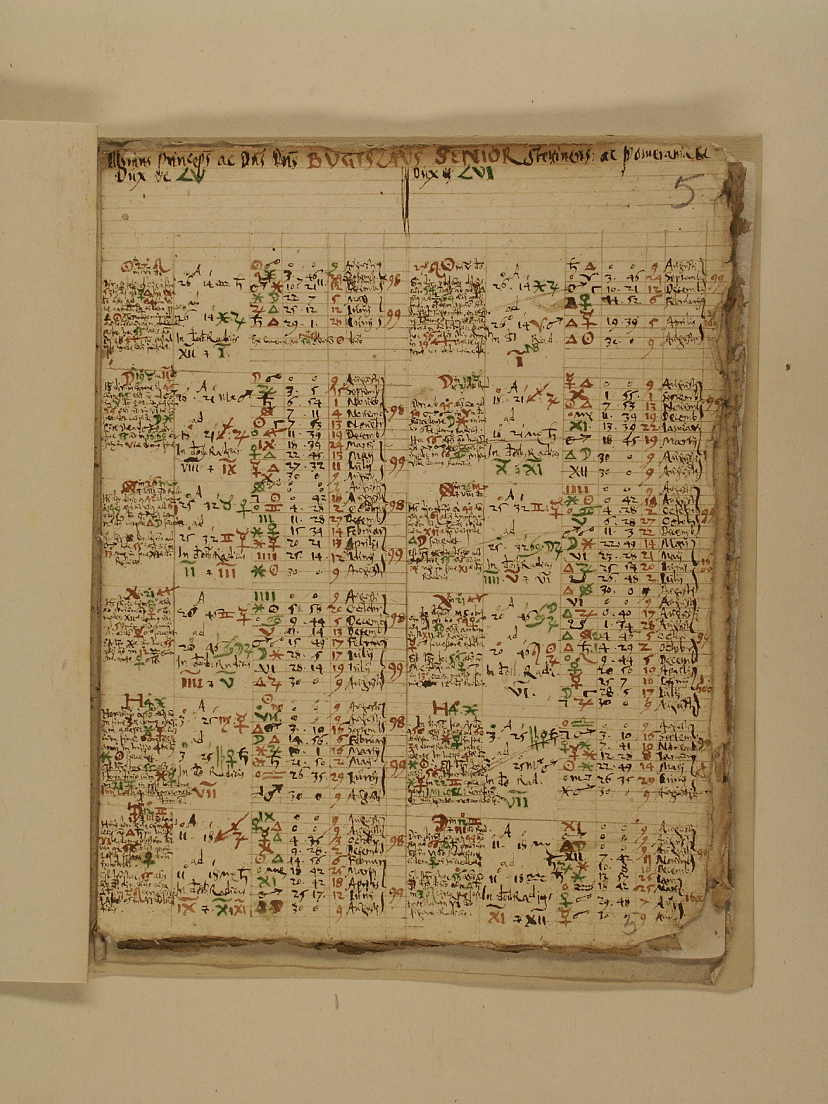 Astrologische Berechnung des Herzogs Bogislaus XIII. von Pommern Geb. 1544.